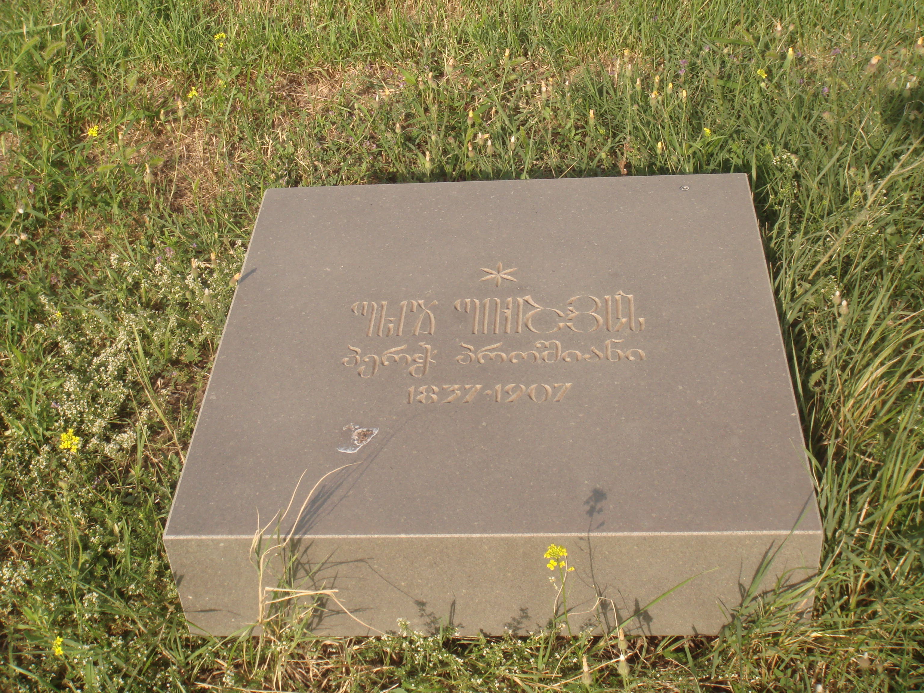 Խոջիվանքի պանթեոն